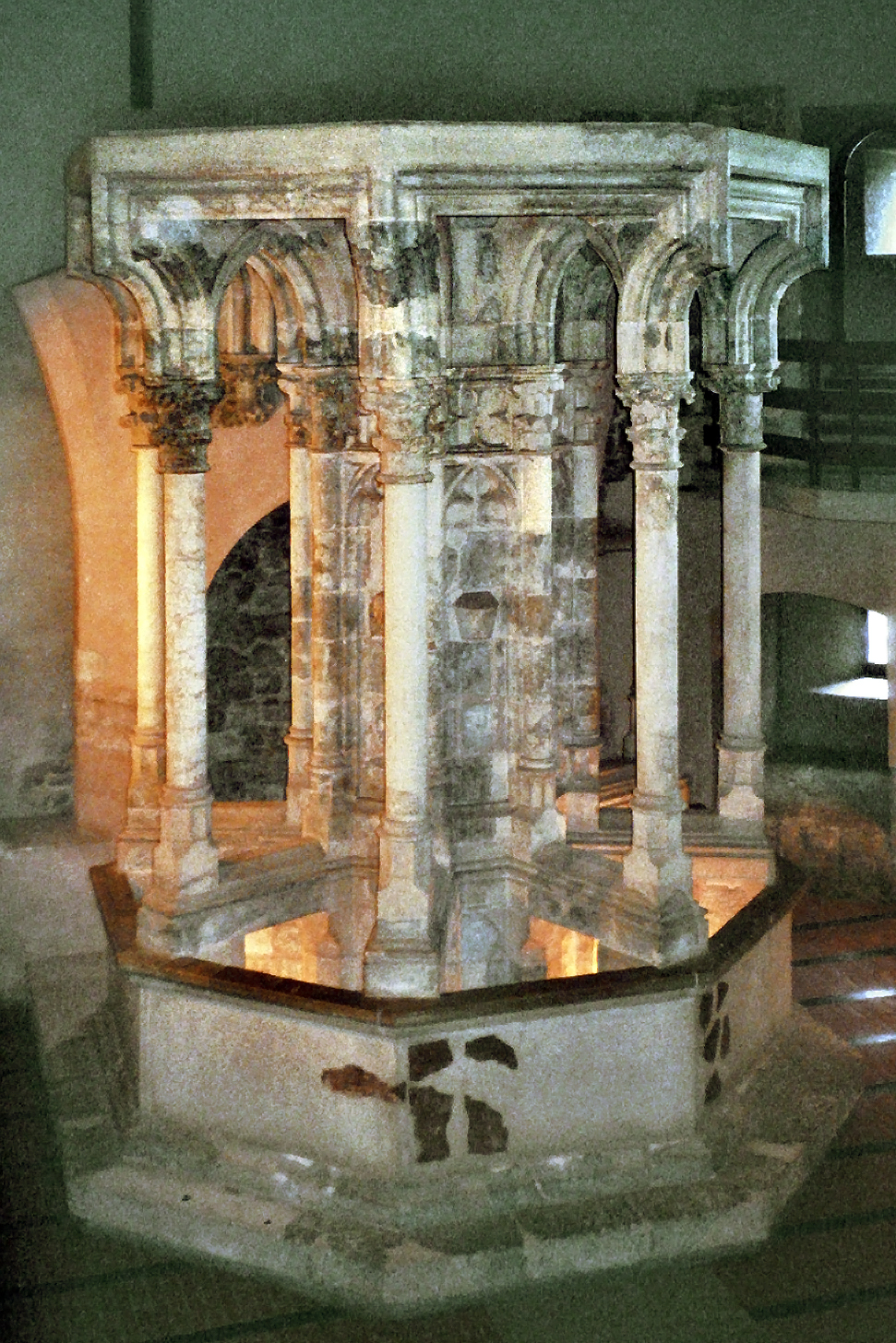 Visegrád - Mátyás Király Múzeum (Salomonturm, Ungarn): Hochgotischer Brunnen, errichtet unter König Sigismund von Luxemburg (1368–1437)